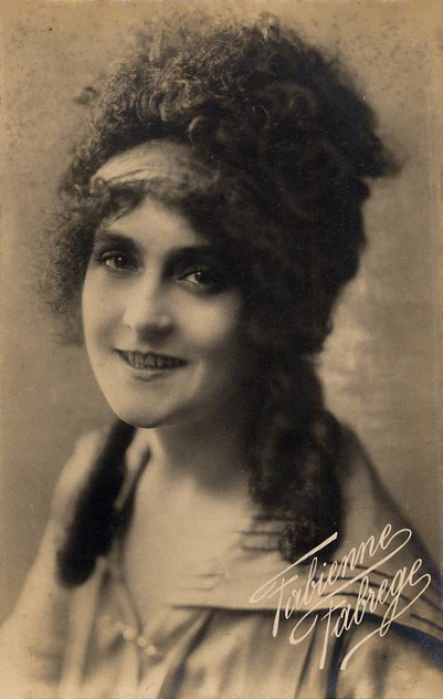 Photo de l'actrice française Fabienne Fabrèges prise en 1917.